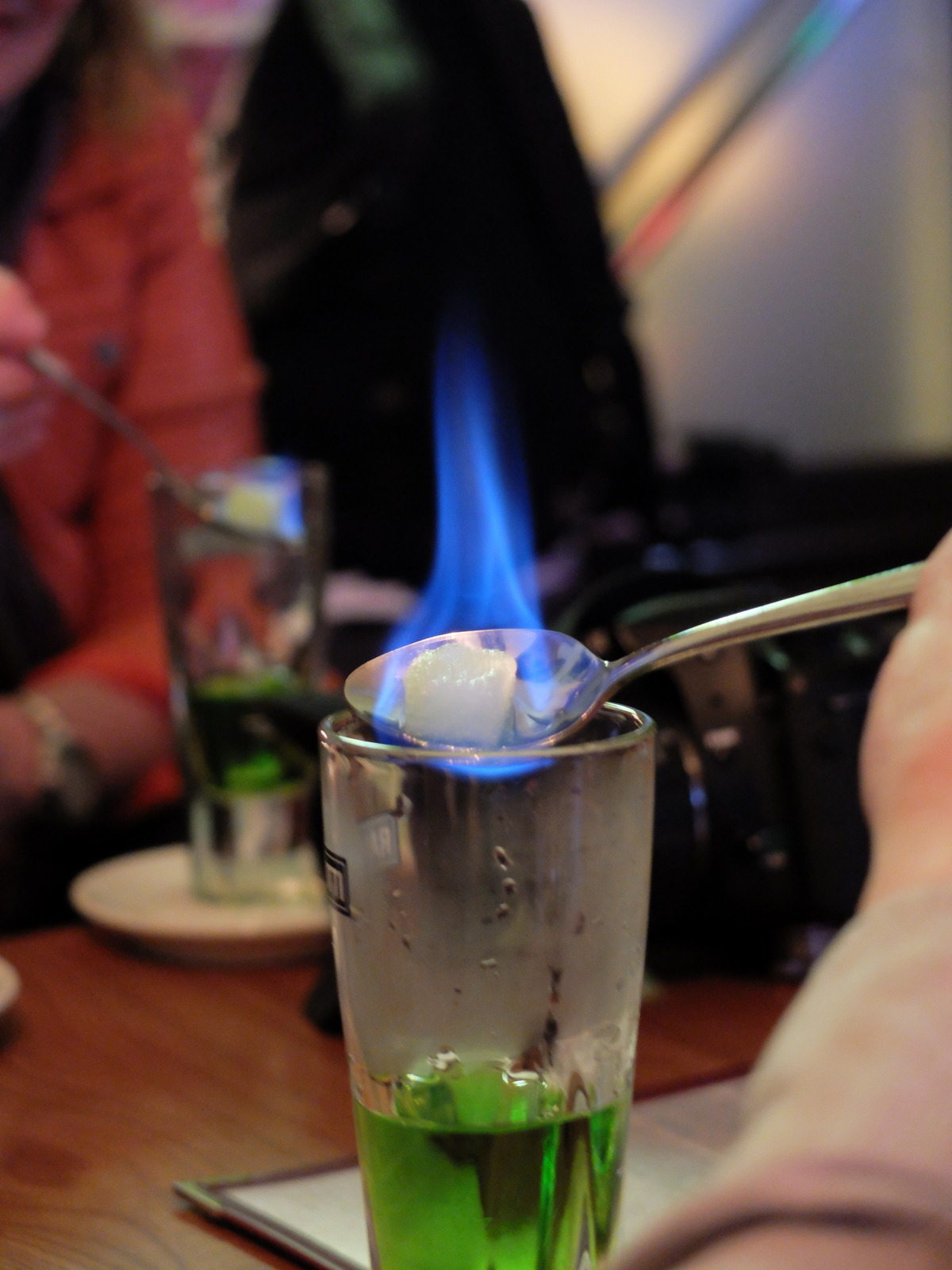 Feuerritual mit einfachem Löffel und Würfelzucker